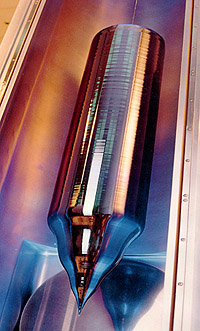 Crystal grown by CZ method